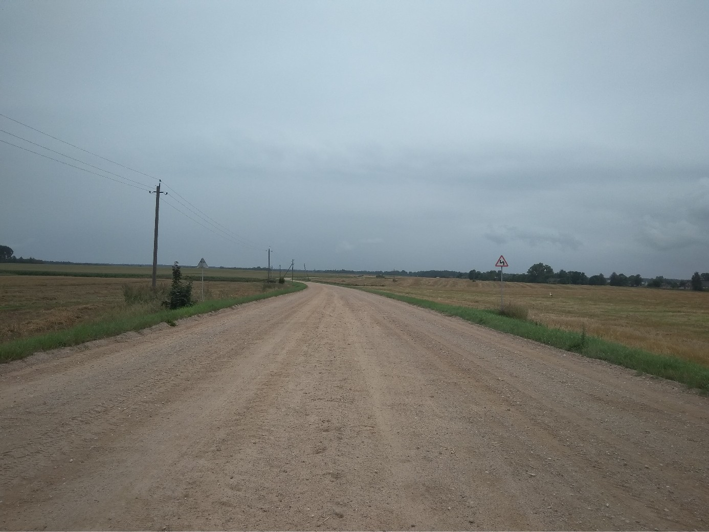 пейзаж у деревни Зубревичи Дзержинского района